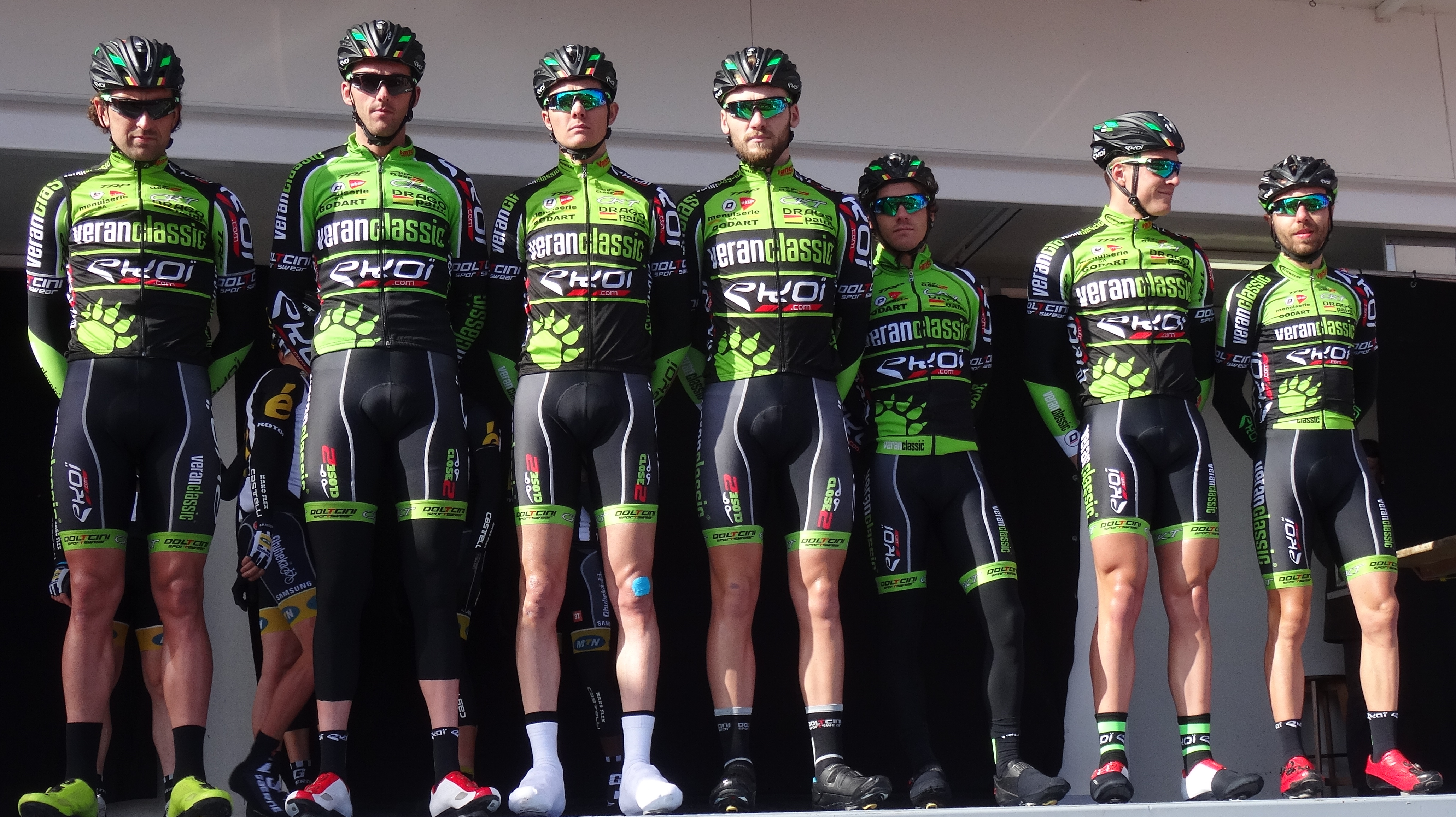 Reportage réalisé le mercredi 4 mars à l'occasion du départ du Samyn des Dames 2015 et du Samyn 2015 à Quaregnon, Belgique.